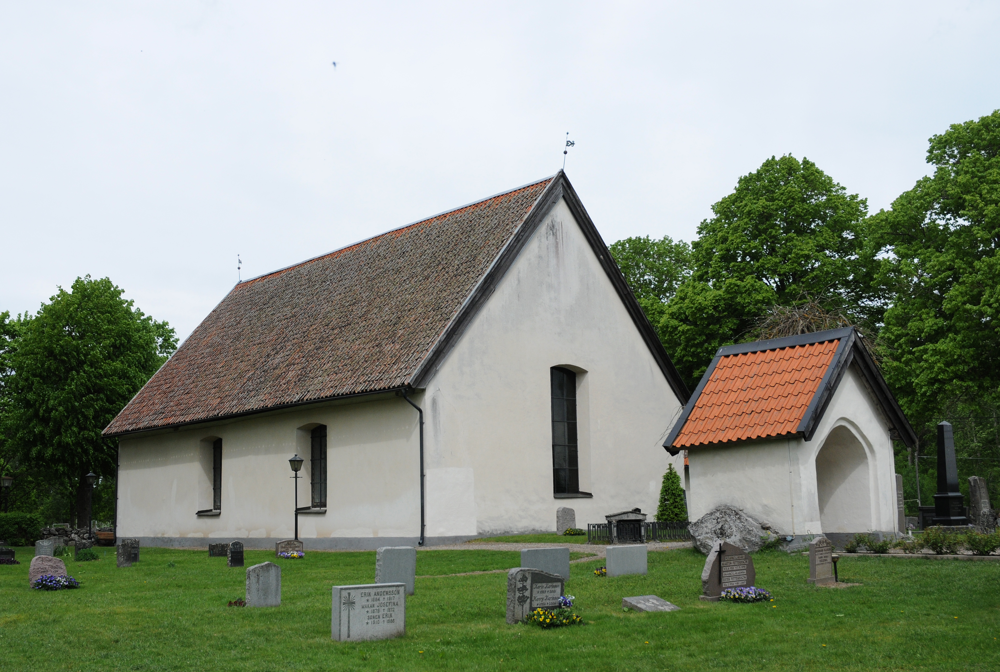 Blacksta kyrka i Flens kommun